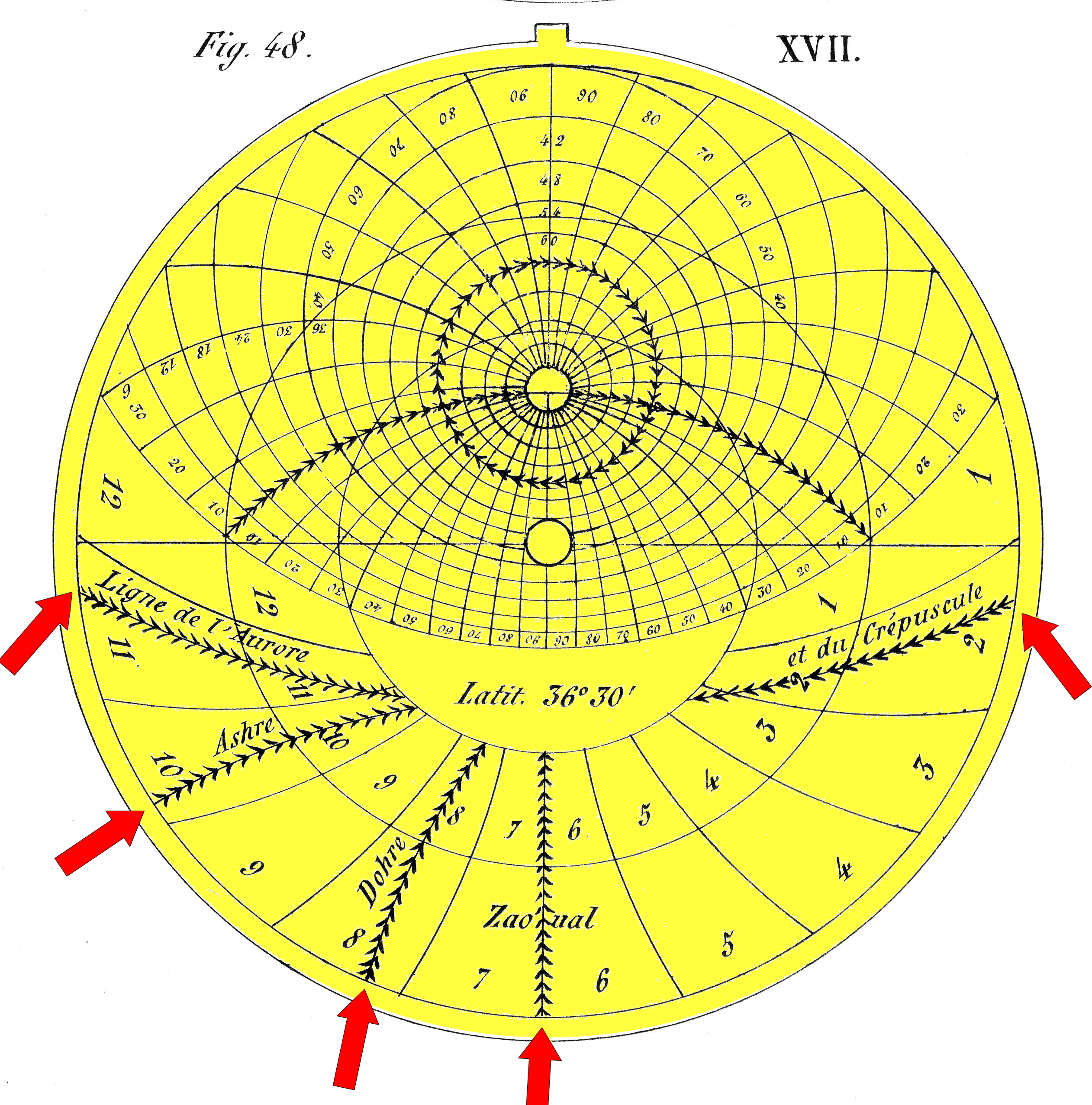 Modificació del fitxer de commons "1c Astrolabe Sedillot détail.png" amb el dibuix d'unes fletxes.